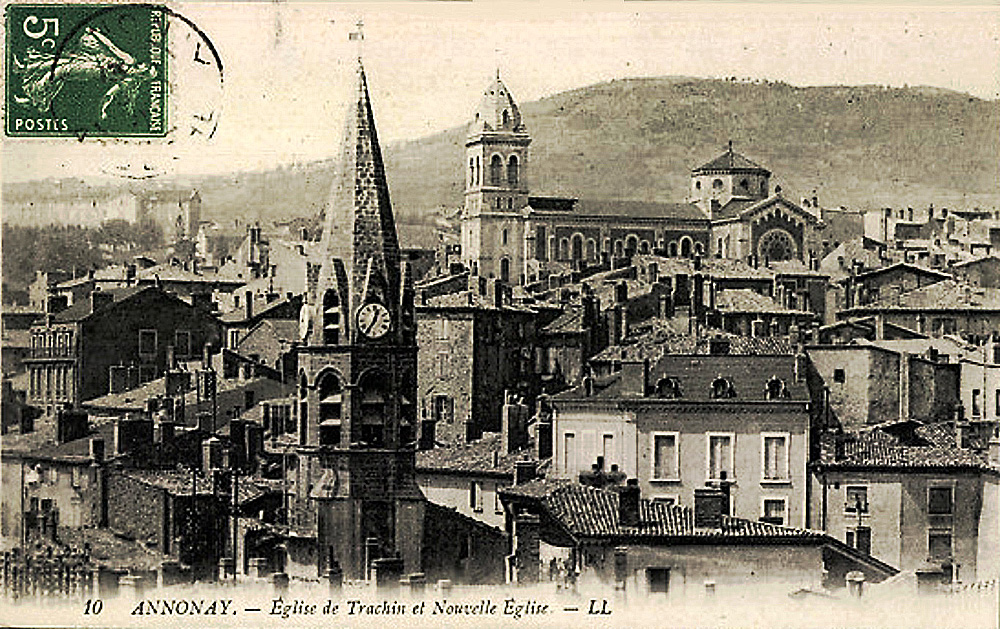 "Eglise de Trachin et Nouvelle Église": Chapelle de Trachin et Église Notre-Dame